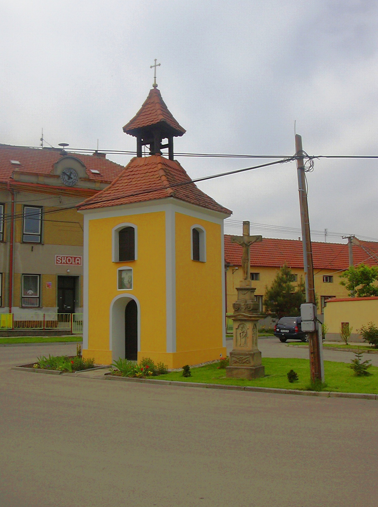 Zvonice, Vážany (Vyškov District - Czech Republic)